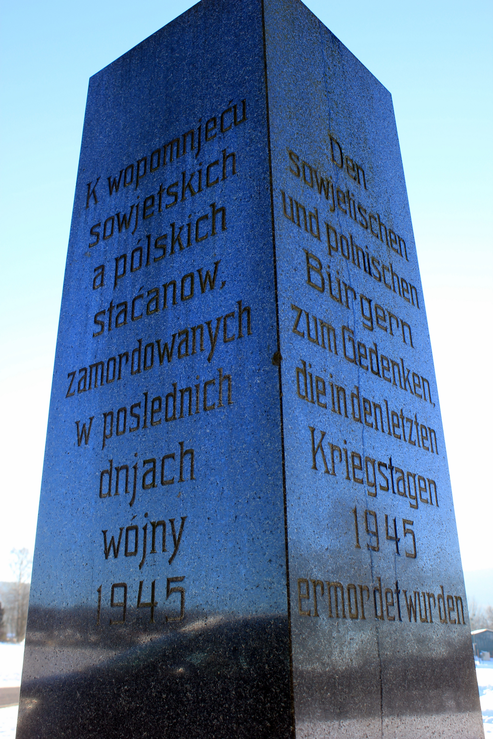 Hornjoserbsce: Wojerski pomnik za padnjenych sowjetskich a pólskich wojakow we Wuježku.